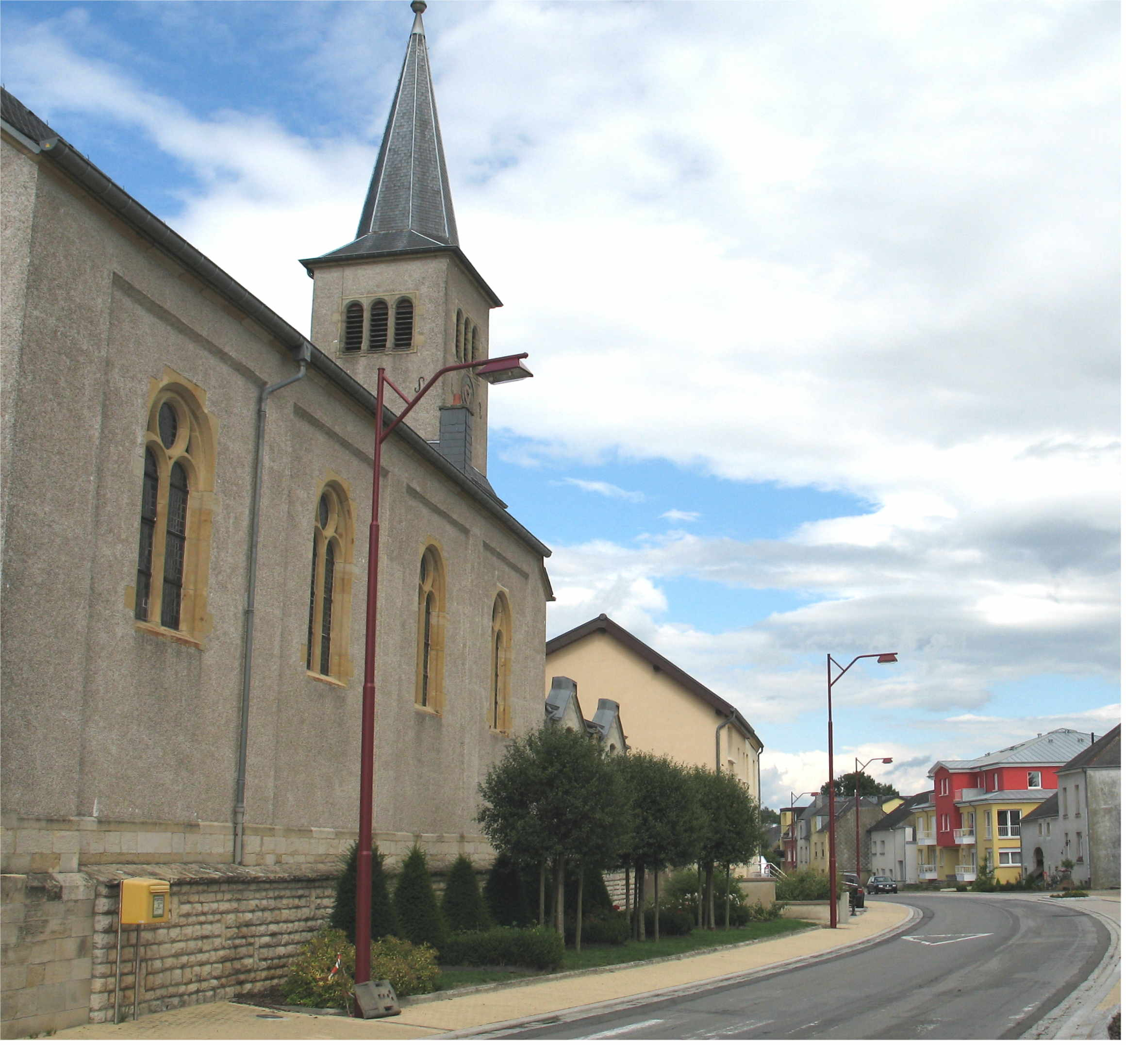 Bei der Kierch zu Hoen. Kategorie:Gemeng Stengefort Hoen